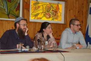 כנס חברותא בהשתתפות הומואים, לסביות ורבנים. בתמונה נראים שלושה ממשתתפי הפאנל (שמאל לימין): הרב ארלה ארהל, בת-עמי נוימאייר פוטשניק מ'בת קול - לסביות דתיות', יהושוע גורטלר מ'חברותא - הומואים דתיים'.